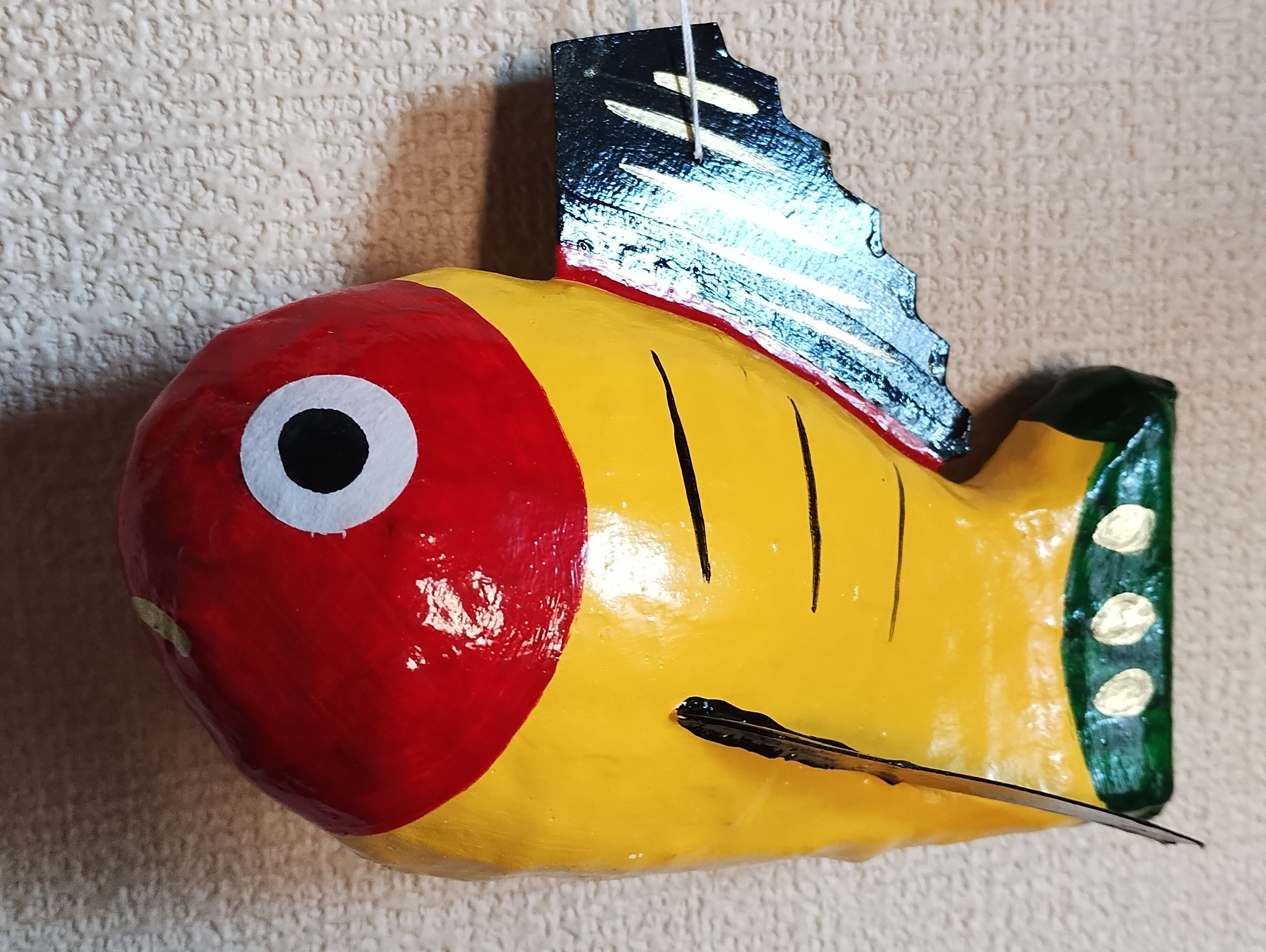 きぶなの土鈴